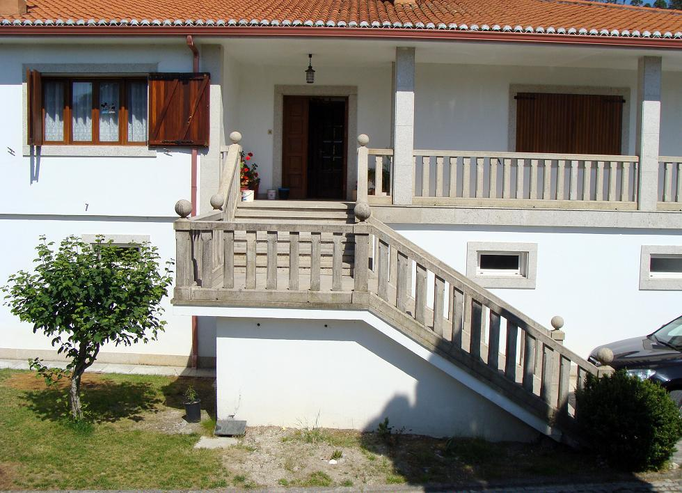 Vivienda rural remozada recientemente y convertida en vivienda urbana. Con su escalera exterior de acceso a la planta principal es típica de Galicia y otras partes de la Península Ibérica